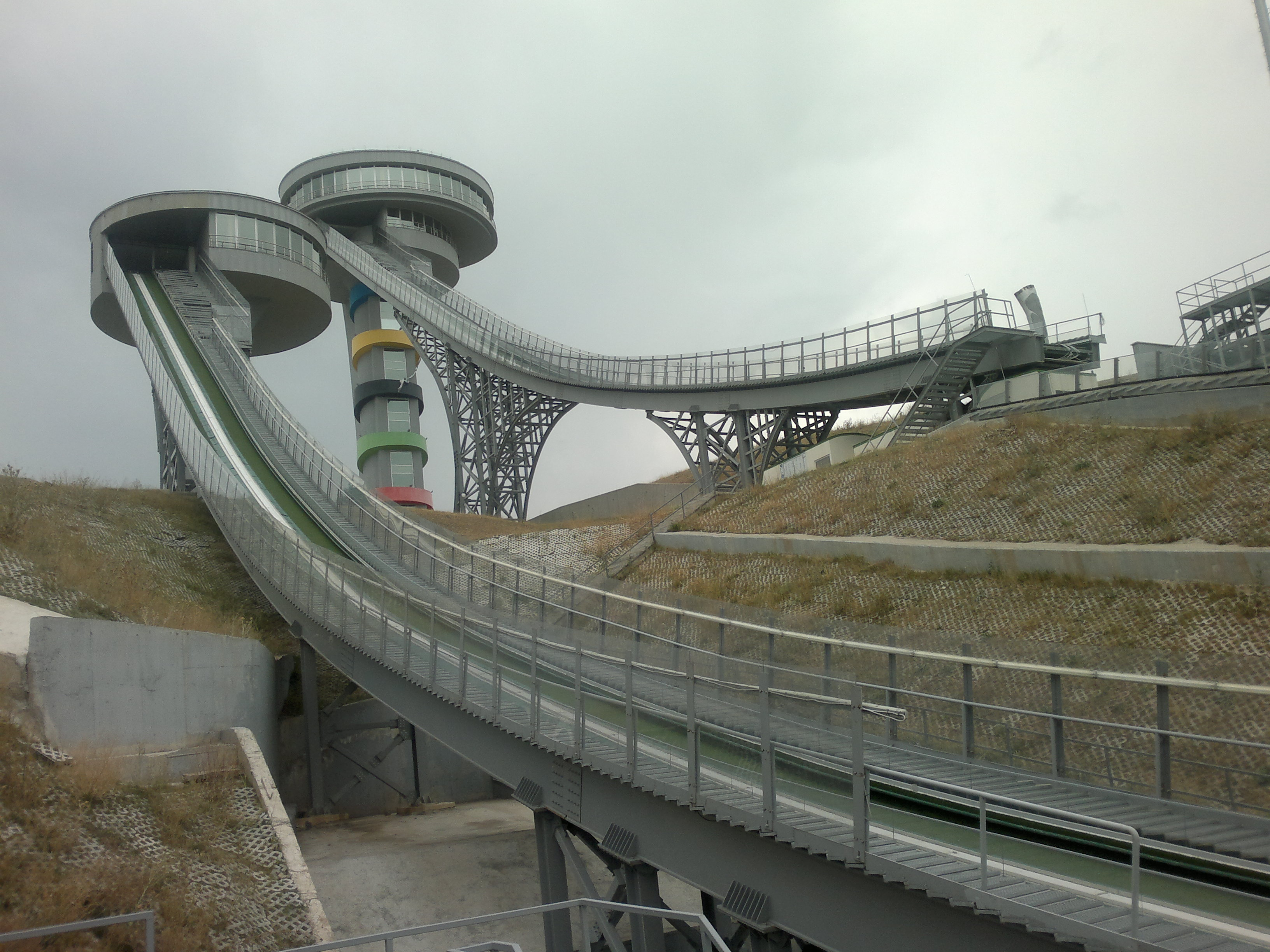 Erzurum Kiremitliktepe Kayakla Atlama Kuleleri.